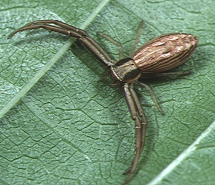 female Runcinia acuminata from Okinawa.